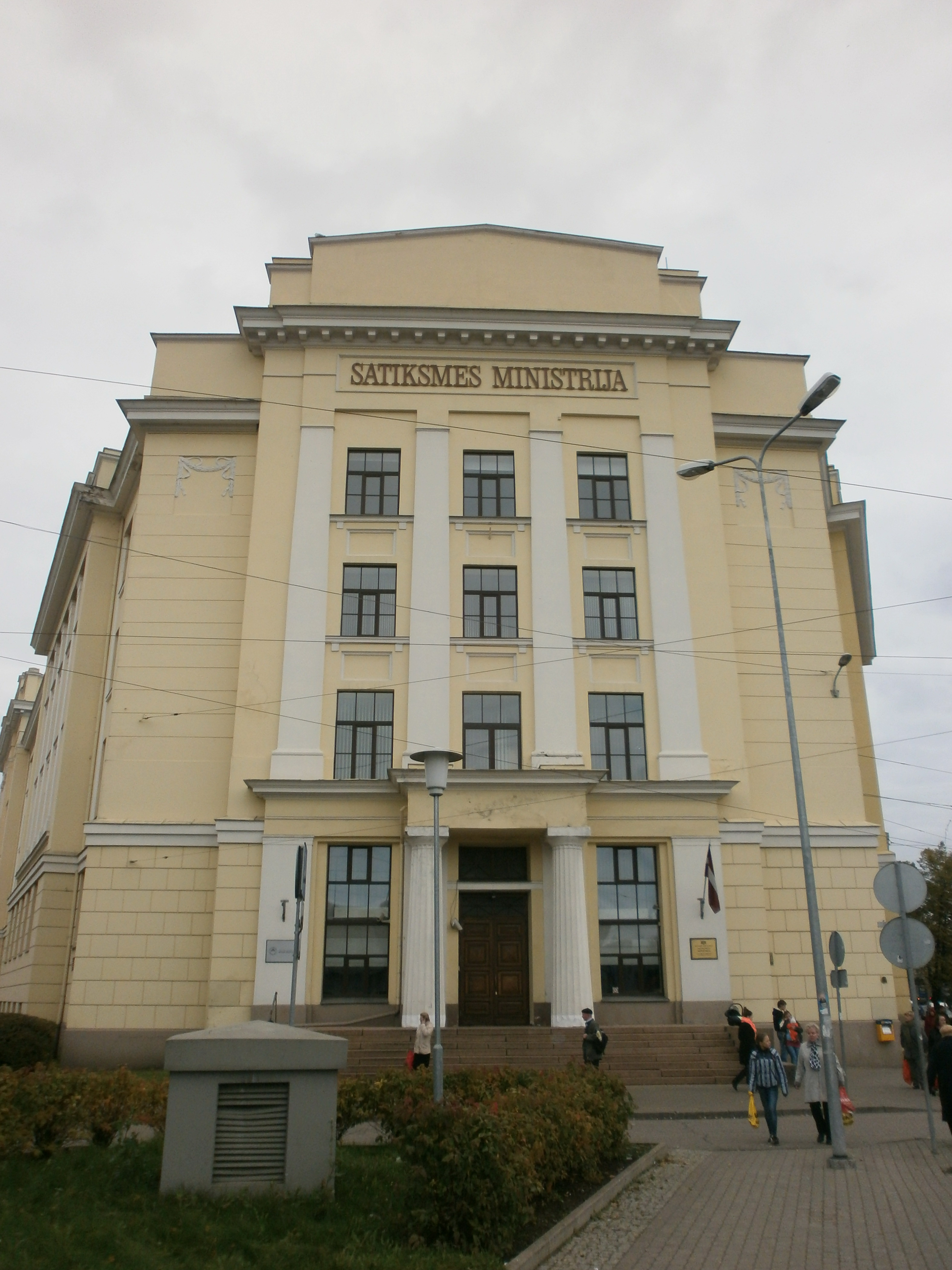 Министерство транспорта Латвии